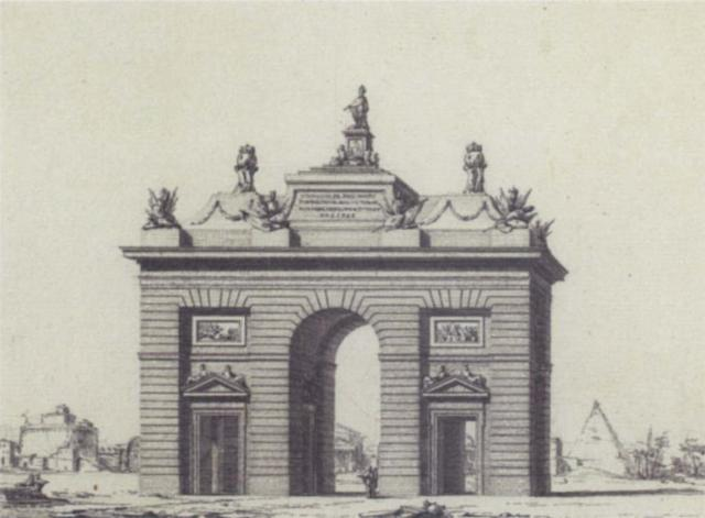 Projet pour un arc de triomphe surmonté d'une statue de Louis XV. Dessin à la plume. 19 x 26 cm. Vendu à Paris, Beaussant et Lefèvre, 19 mars 2004, lot n° 16.